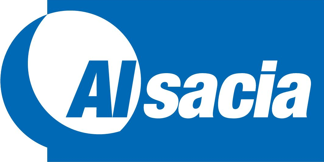 Logo empresa de Transantiago